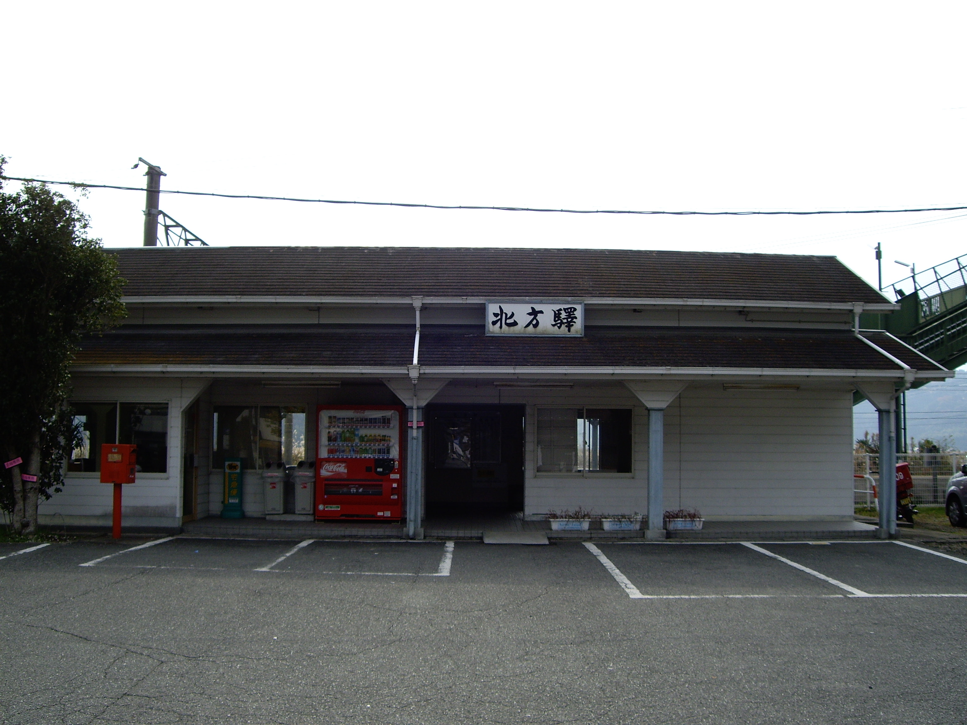 Kitagata Station(北方駅 (佐賀県))